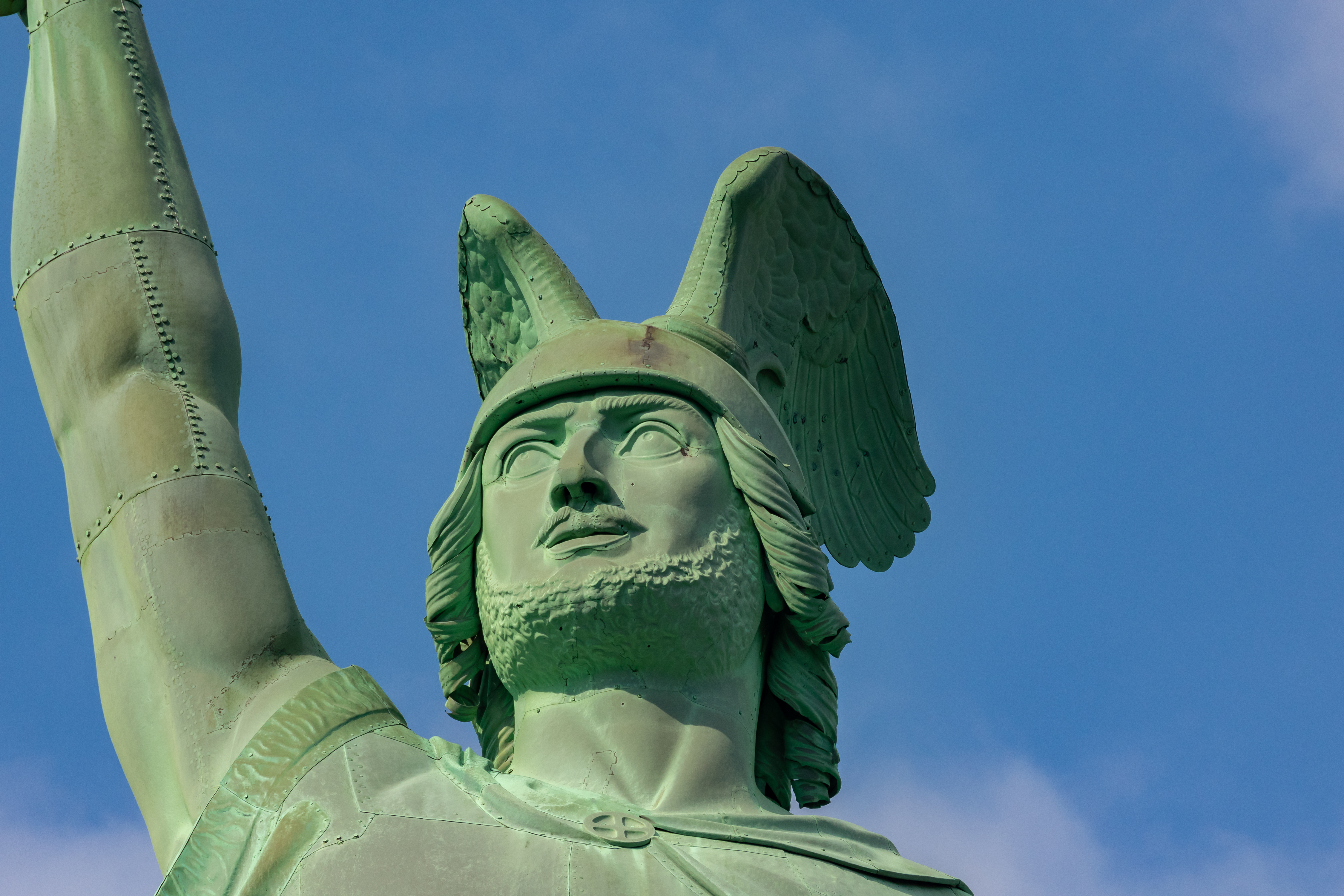 Kopf des Hermannsdenkmals bei Detmold